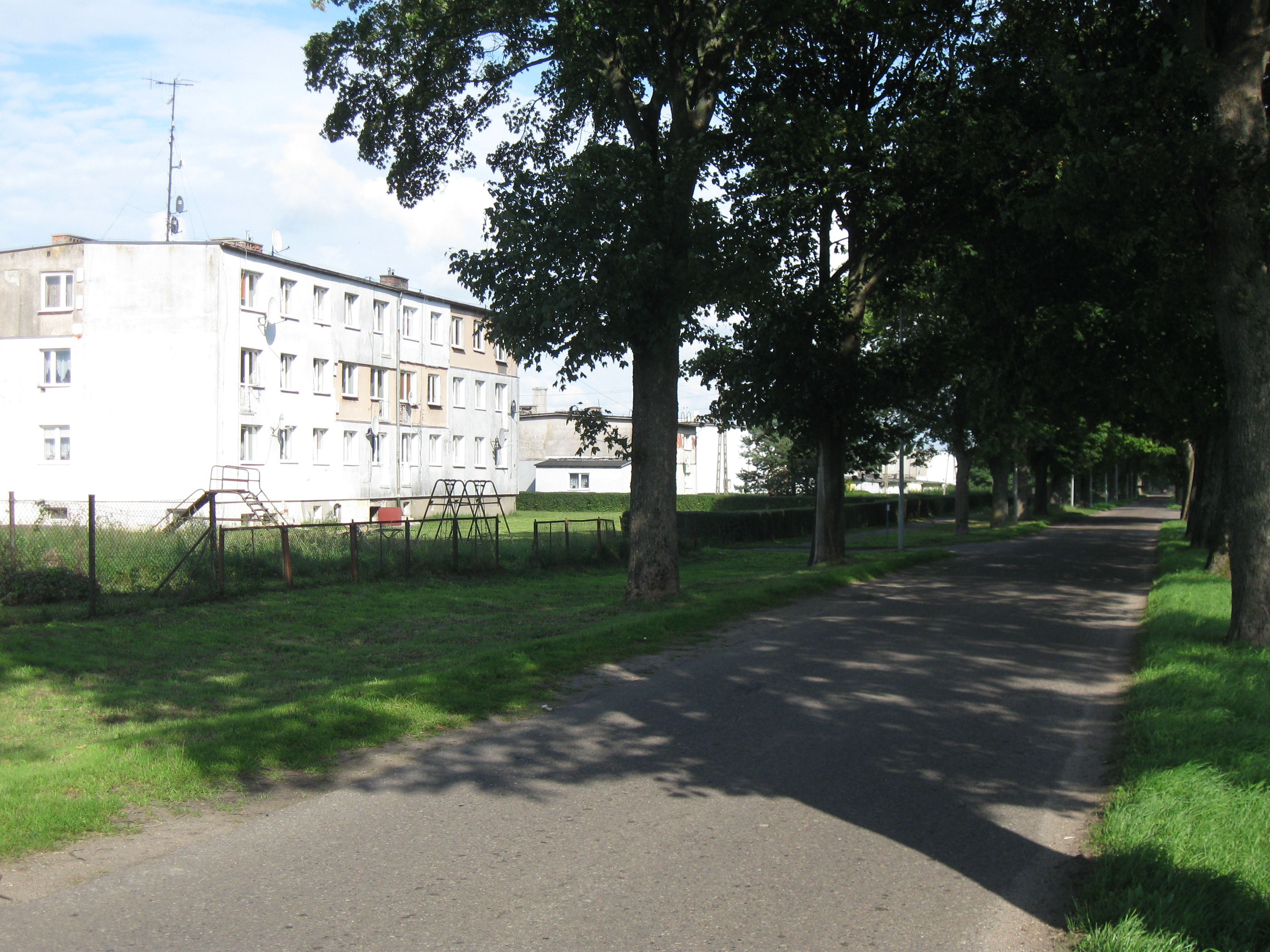 Część popegerowska wsi Kędrzyno, wybudowana po II wojnie zaledwie 0,5 km od Byszewa, ale aż 2 km od "starego" Kędrzyna